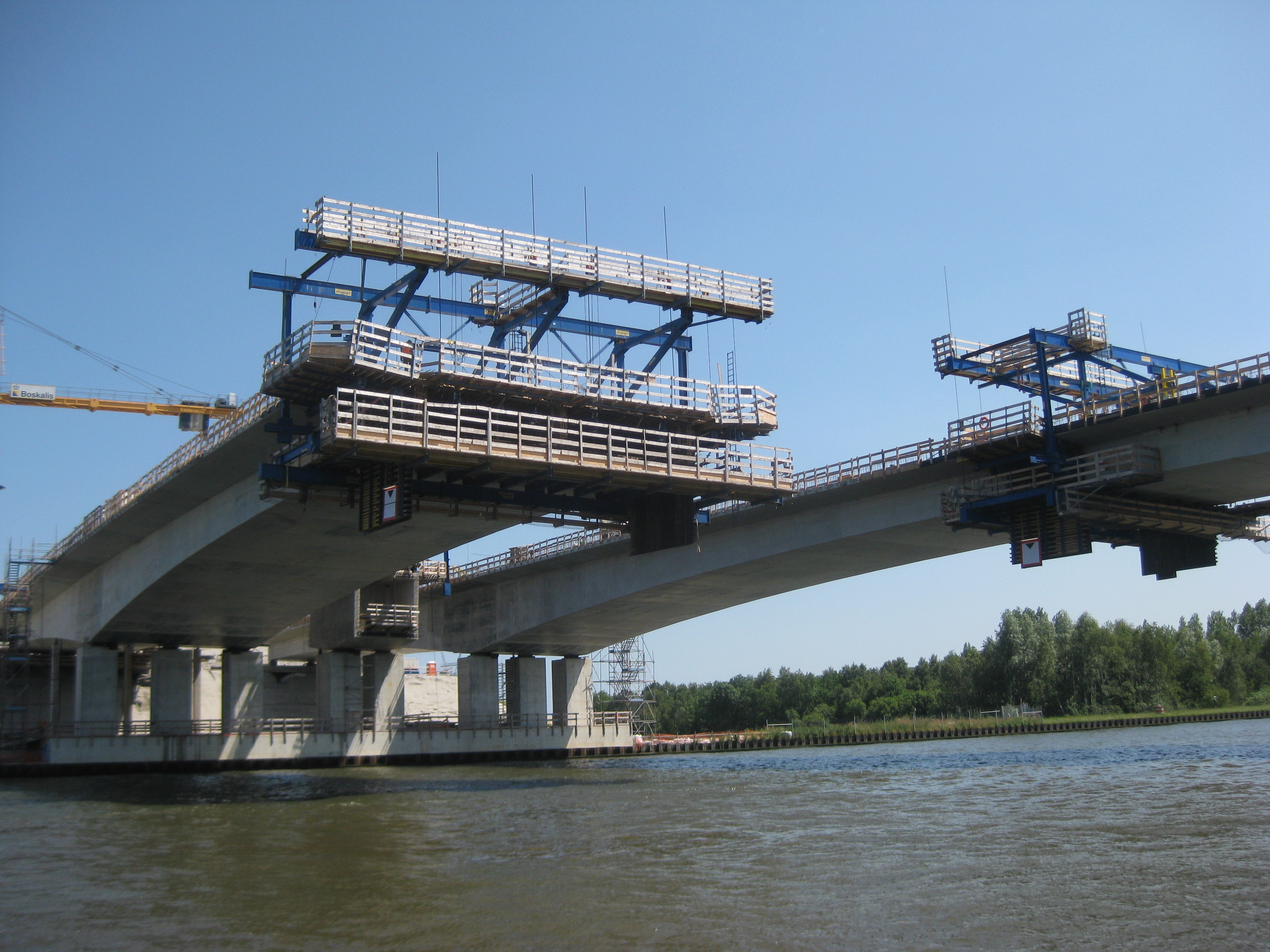 Nieuwe brug over het Amsterdam-Rijnkanaal ten zuiden van de Muiderbrug. Onderdeel van de nieuwe verbinding van de A9 naar de A1.